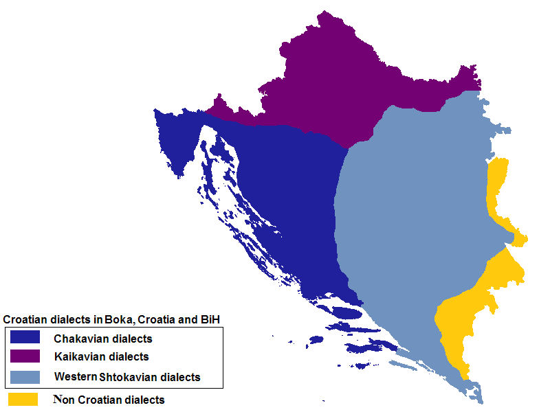 Hrvatski dijalekti u 15.st-u